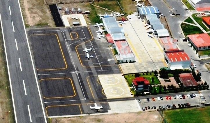 Panorámica del Aeropuerto Nacional Ing. Juan Guillermo Villasana en Pahuca, México.